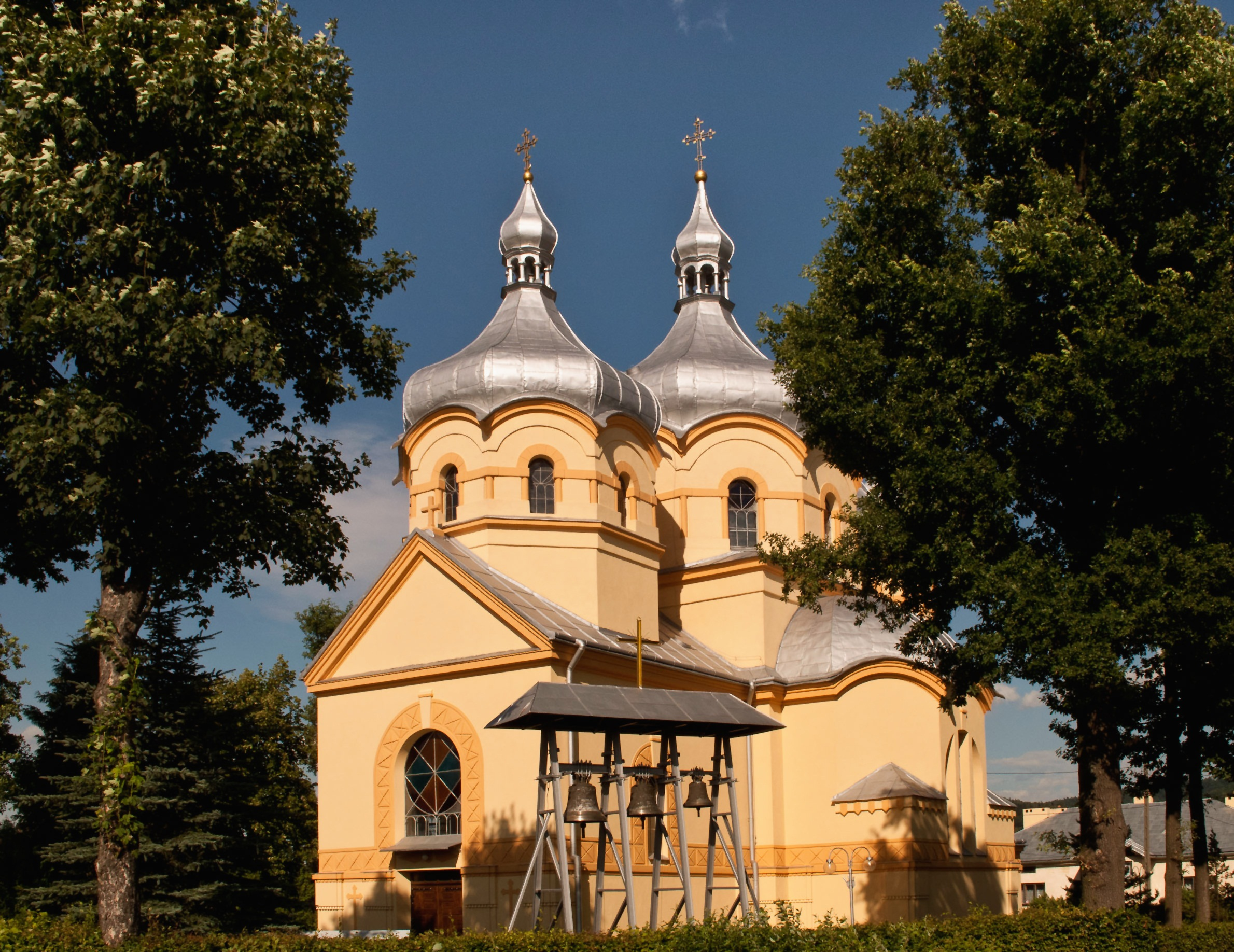 Krasne, pow. krośnieński - cerkiew pw. św. Michała, ob. kościół rzymskokatolicki parafialny pw. Niepokalanego Serca NMP, 1914